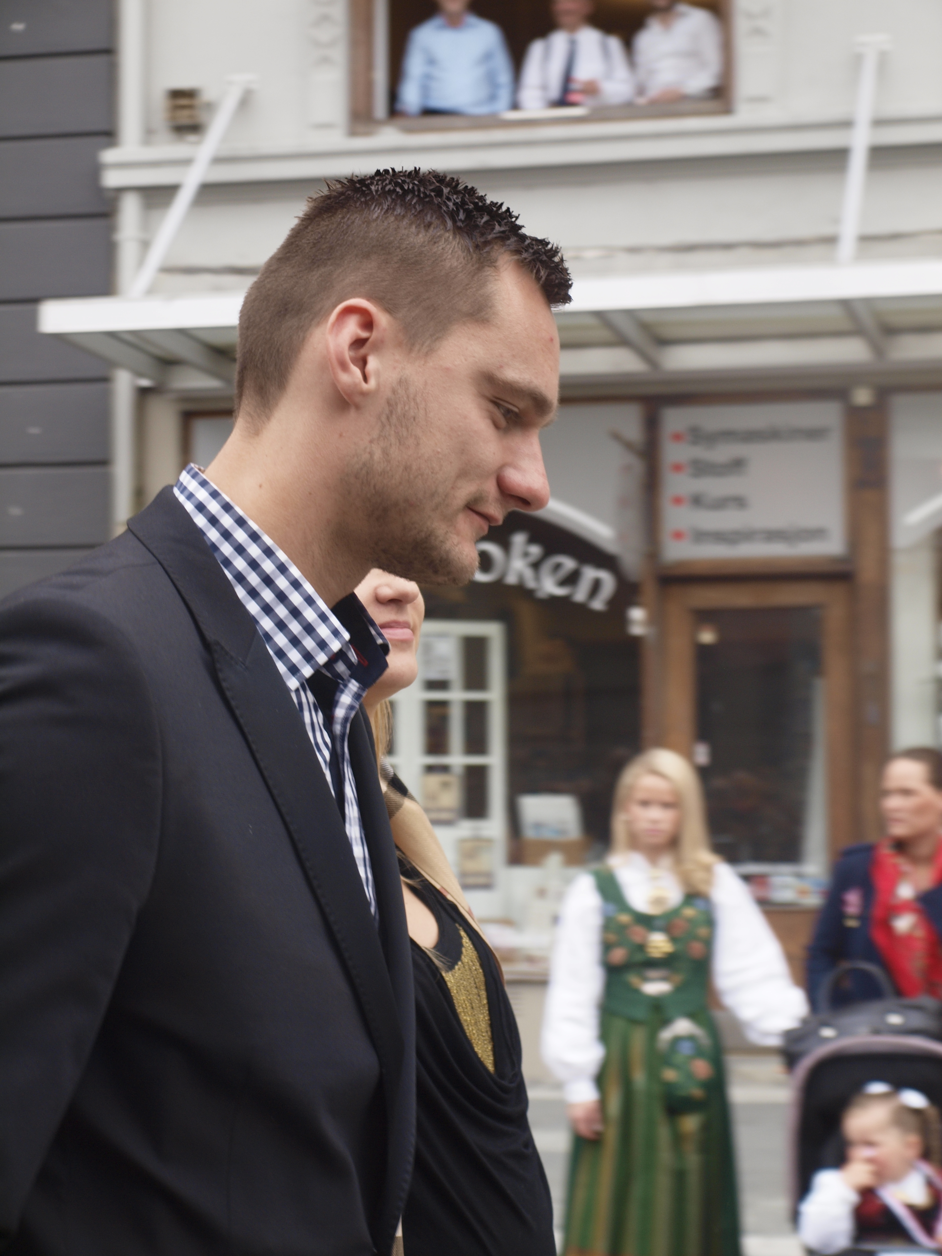 Piotr Leciejewski in 2013